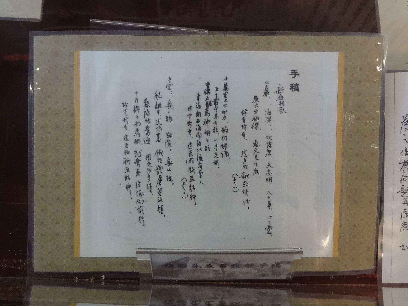 錢穆故居展示的錢穆手書新亞書院校歌歌詞手稿。